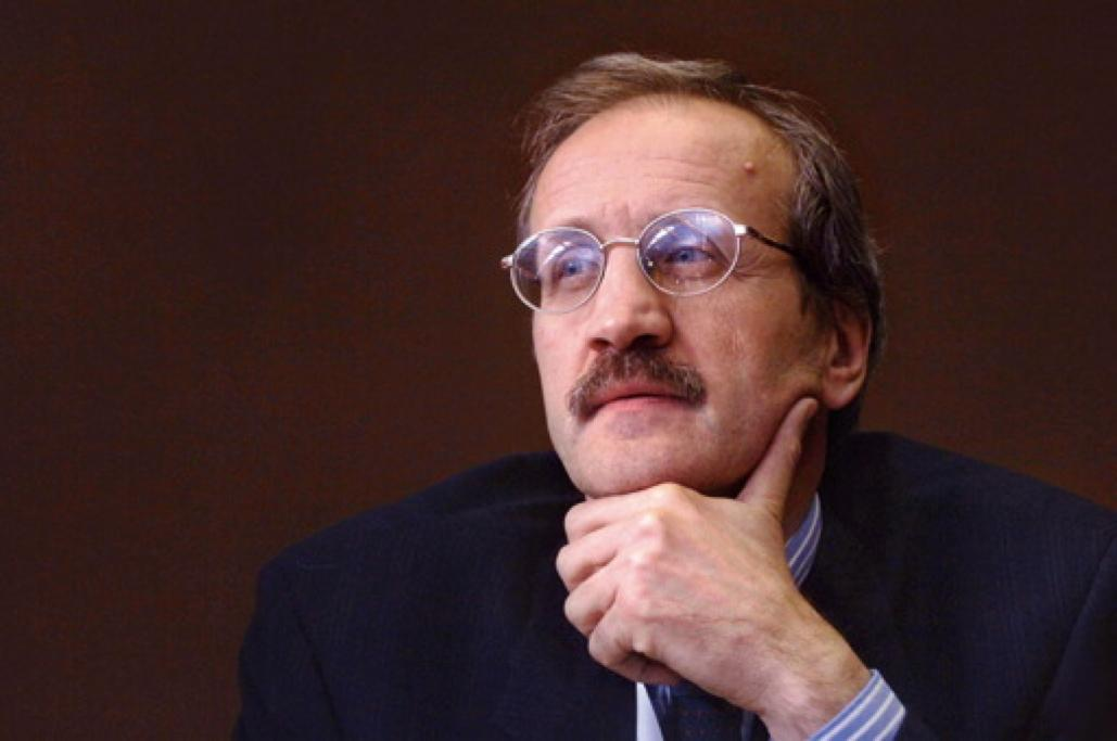 Massimo Baldini